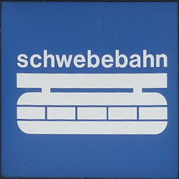 Höhne, Wuppertal (Haltestellenschild ausgeschnitten und perspektivisch korrigiert)